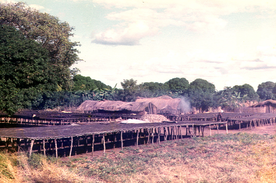 Fischtrocknung am Malawisee, kleiner Fische werden auf diesen Matten an der Luft getrocknet und dann wie hier zu einem Haufen zusammengefegt und auf dem Markt verkauft